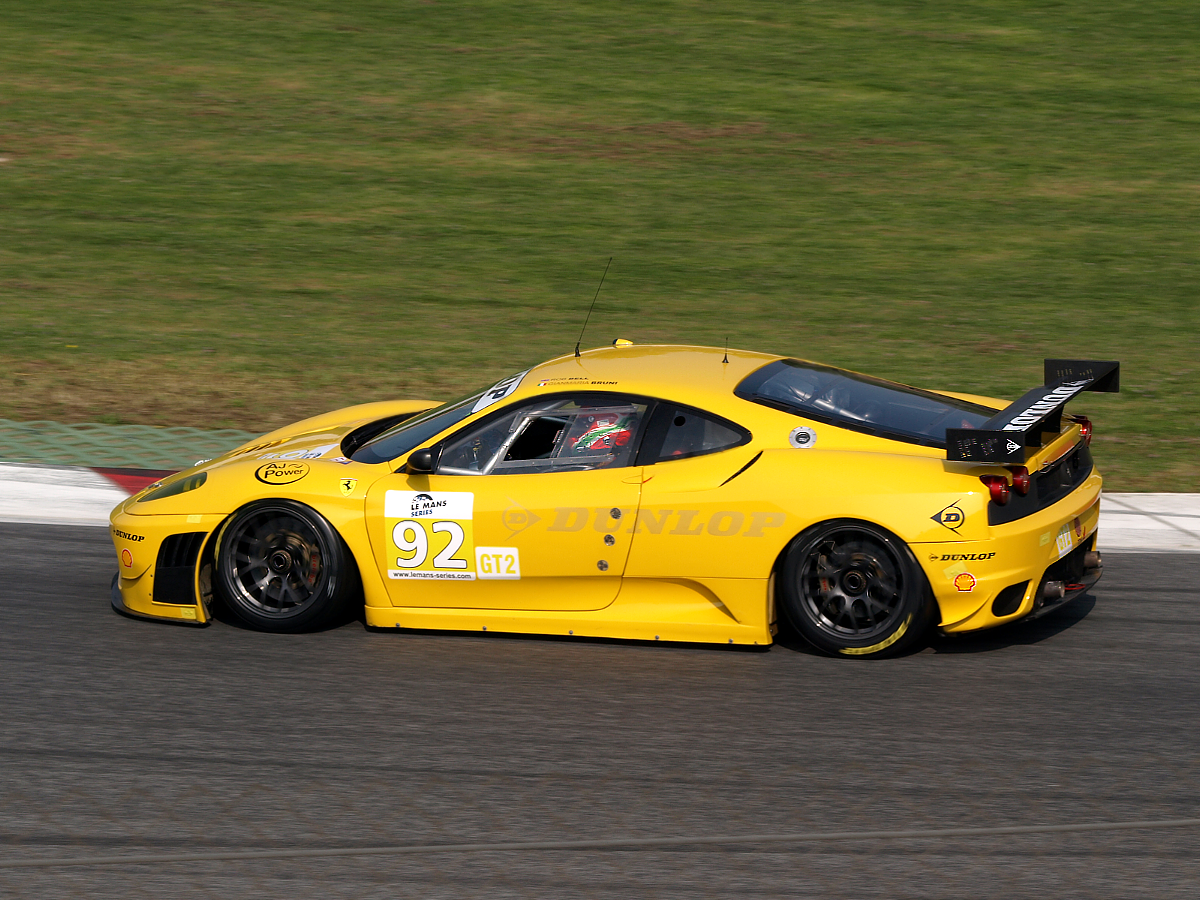 A final de recta del Circuit de Catalunya.